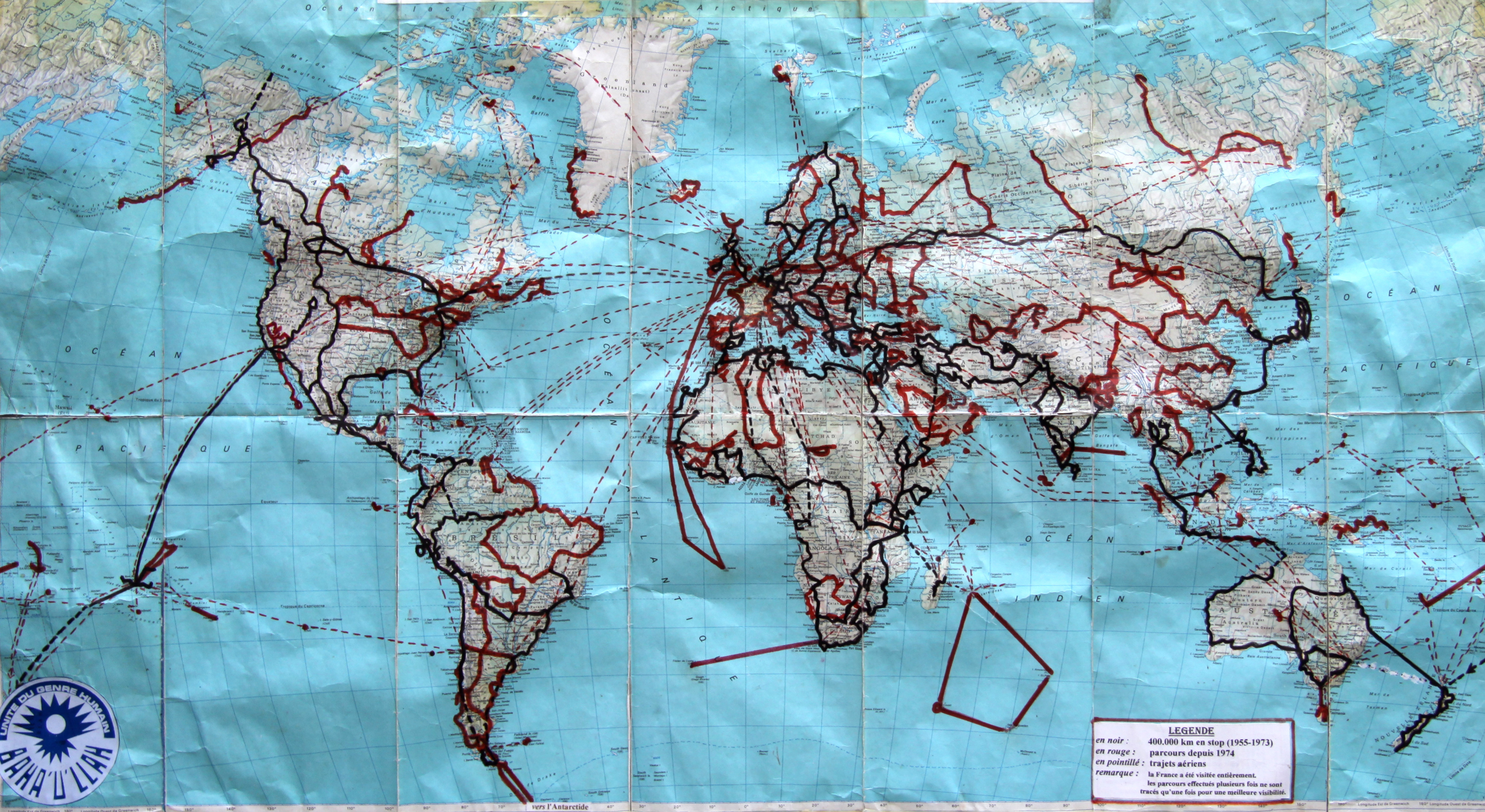 Parcours total en stop de 1955 à 2016